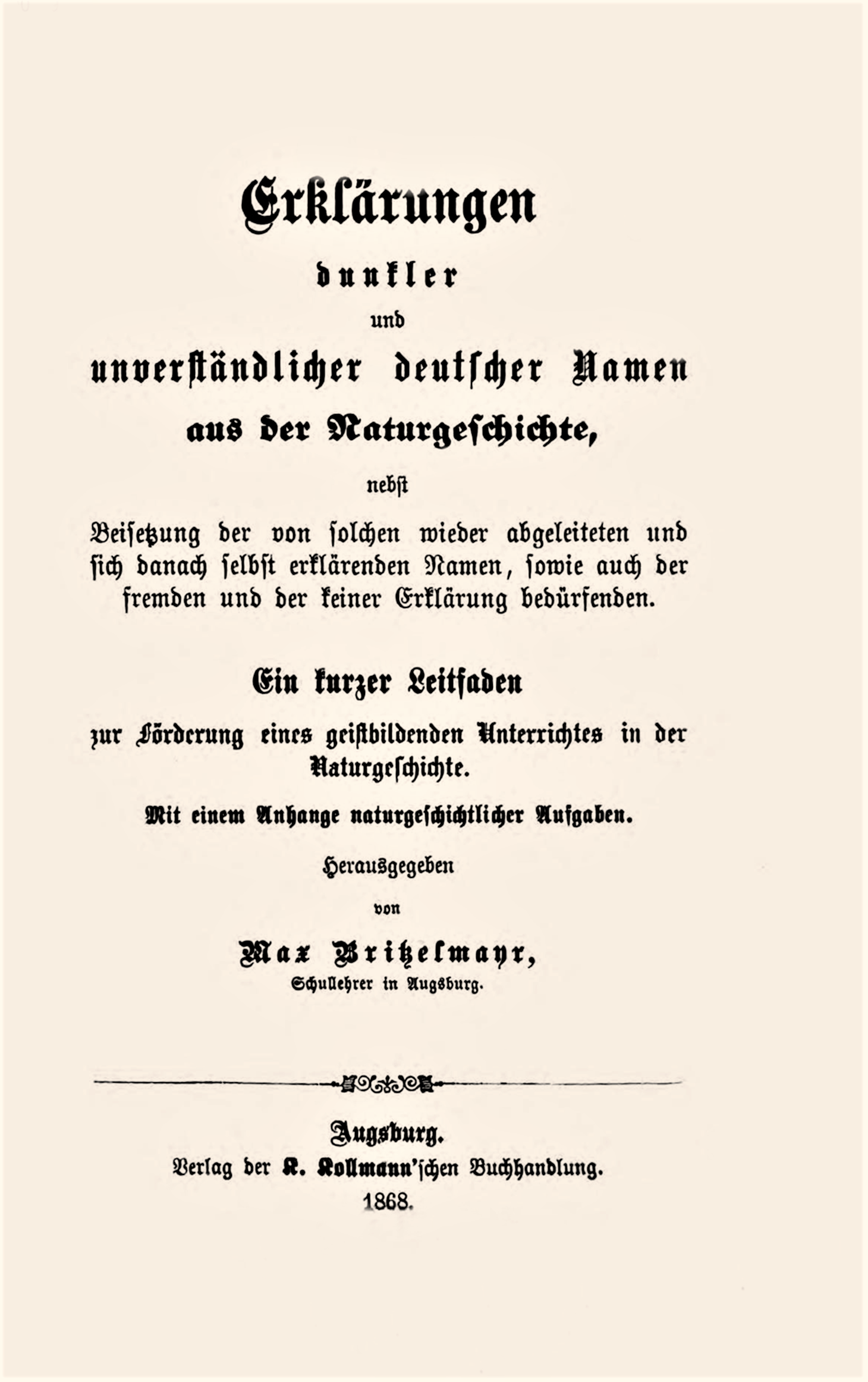 Britzelm.: „Erklärungen dunkler und unverständlicher deutscher Namen in der Naturgeschichte”, Verlag K. Kollmannsche Buchhandlung, Augsburg 1868, Cover